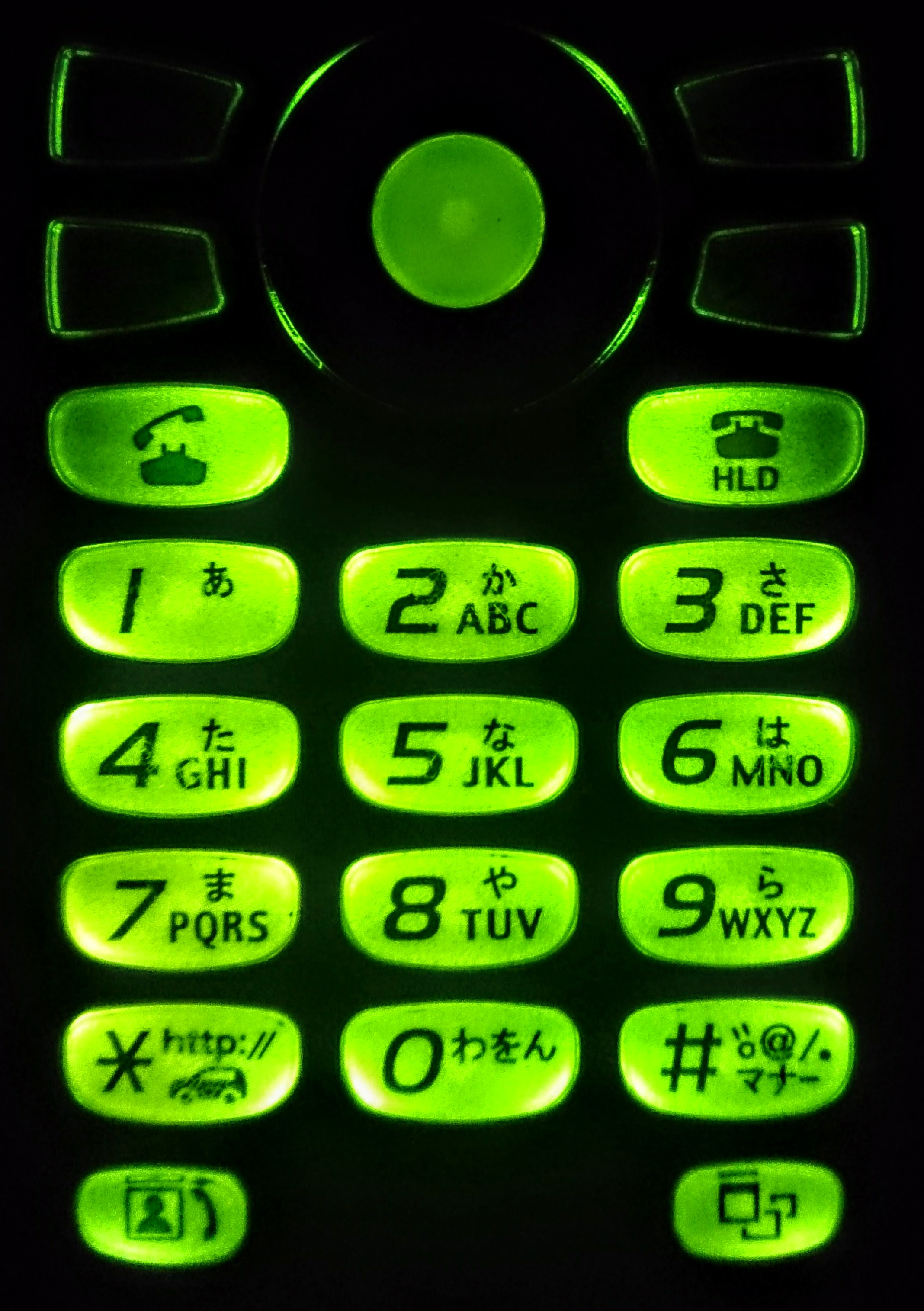 P2102V(シルバー)のボタン操作部・照光方式は「面照光」である